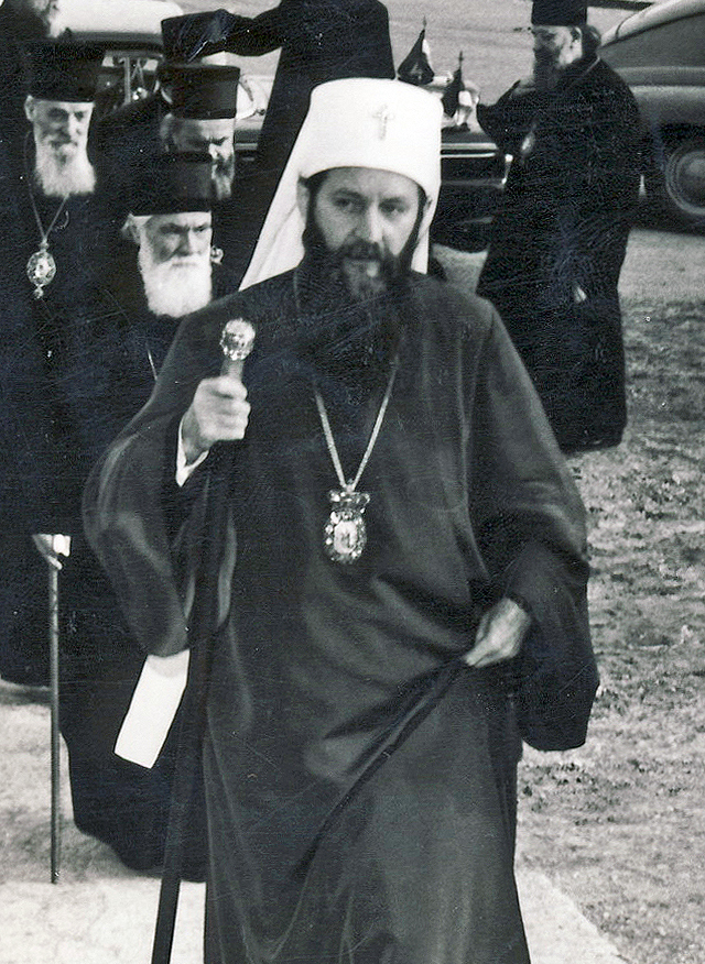 Патриарх Сербский Герман посещает Духовную Семинарию святого Саввы.